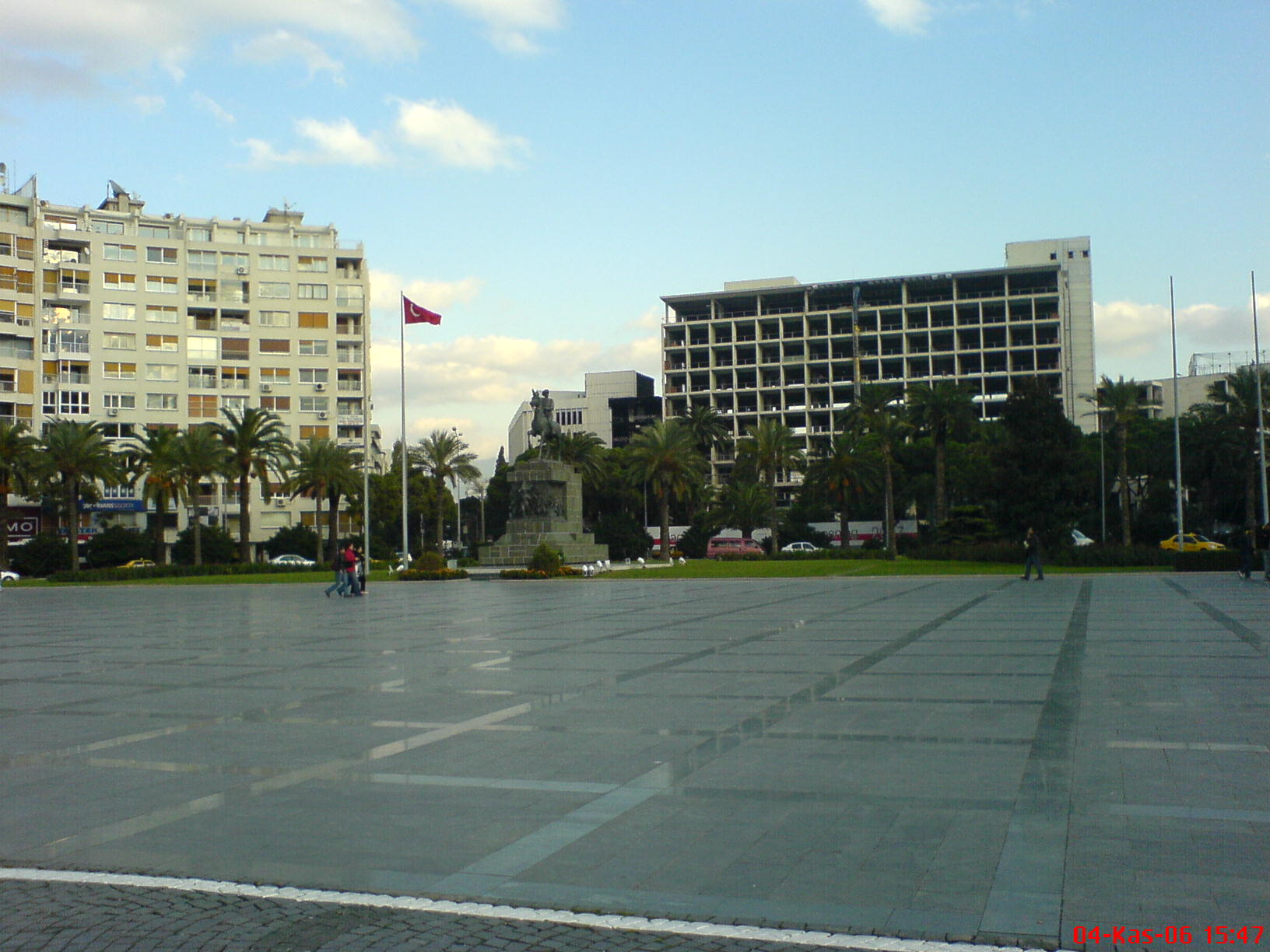 Cumhuriyet Meydanı,İzmir